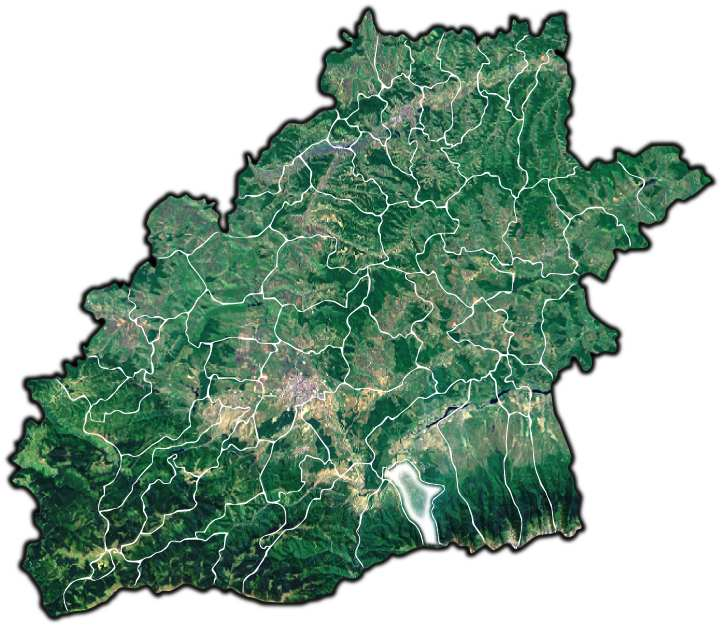 Racovita_jud_Sibiu.